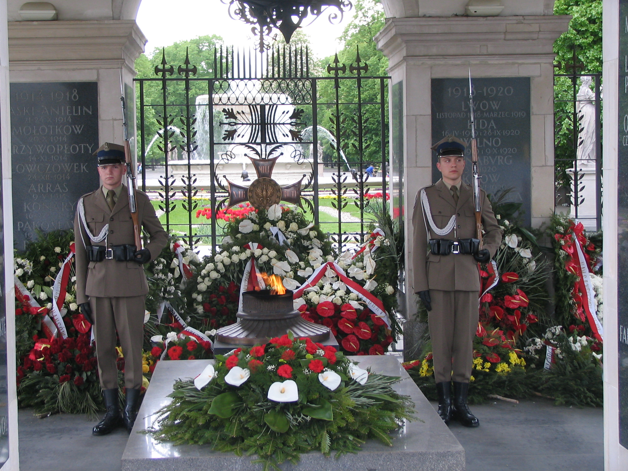 Warta przy Grobie Nieznanego Żołnierza w Warszawie